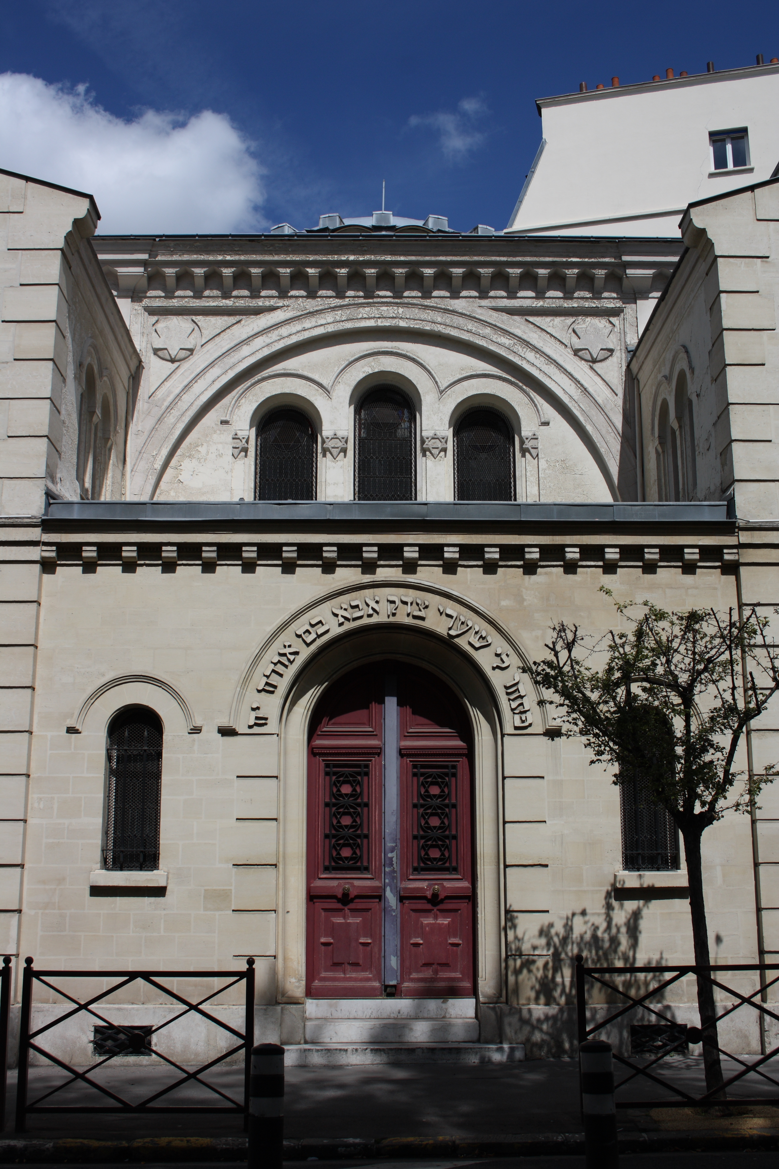 Synagoge von Neuilly, 12, rue Ancelle in Neuilly-sur-Seine, ehemaliger Eingang in der Rue Jacques-Dulud